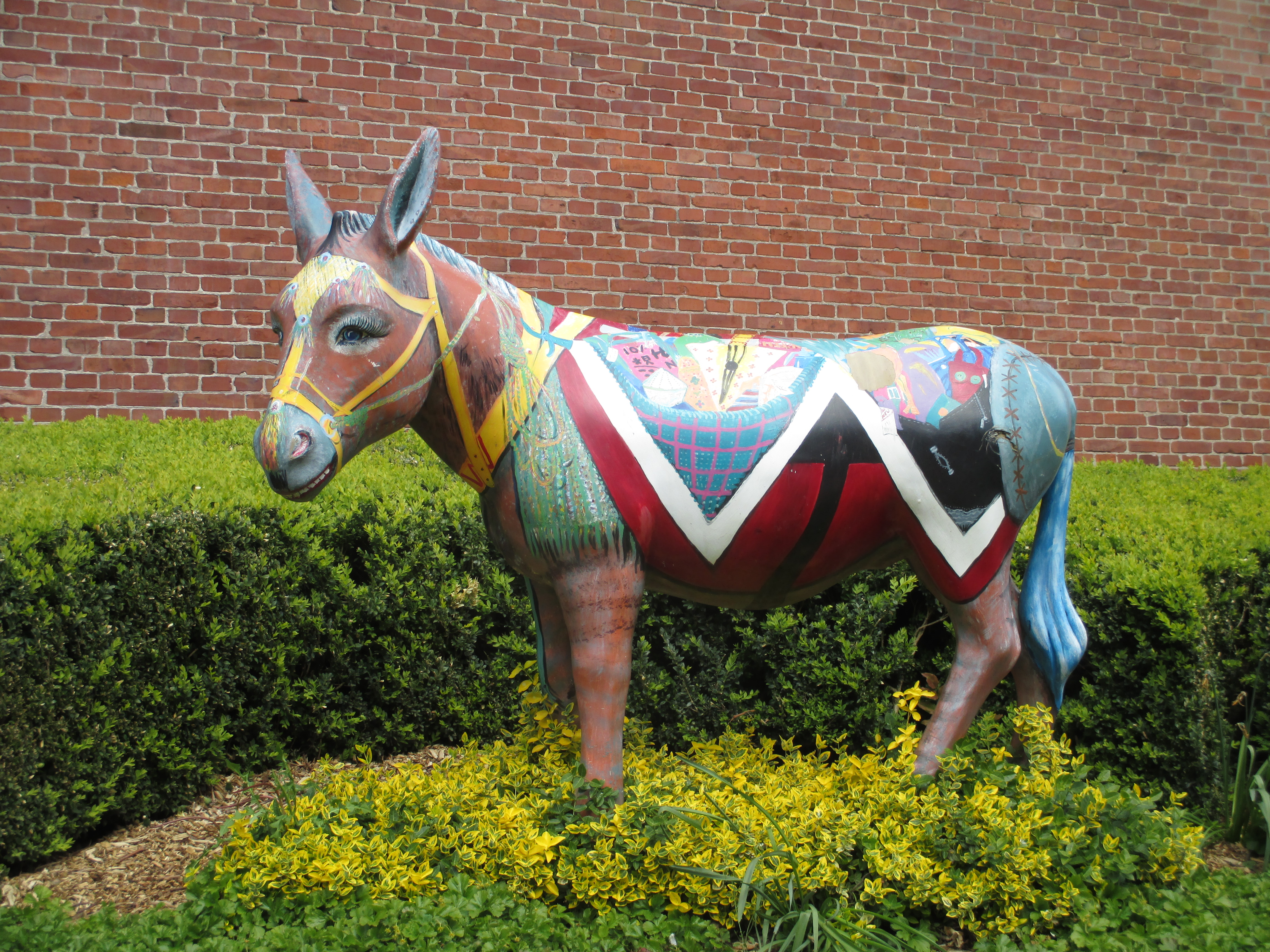 Einer der "111 Esel für Wesel" am Berliner Tor. Als Stadtmaskottchen dient er als Werbeträger. Bemalt wurden sie von verschiedenen Künstlern und Vereinen.